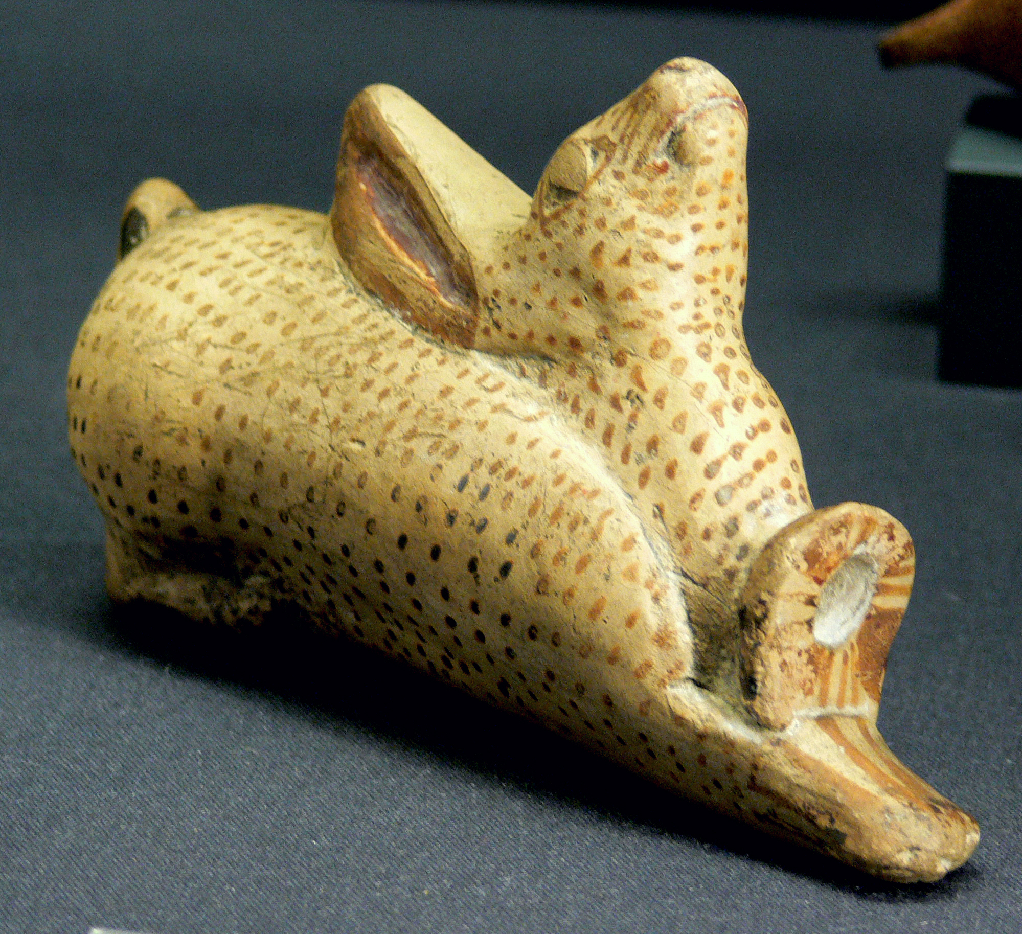 Wien, Kunsthistorisches Museum, Antikensammlung, Hase (figürliches Gefäß), mittelkorintisch, 590–570 v. Chr., Inv. Nr. IV 1293 (evtl. erlegter Hase? siehe File:Aryballos hanging hare Staatliche Antikensammlungen.jpg)